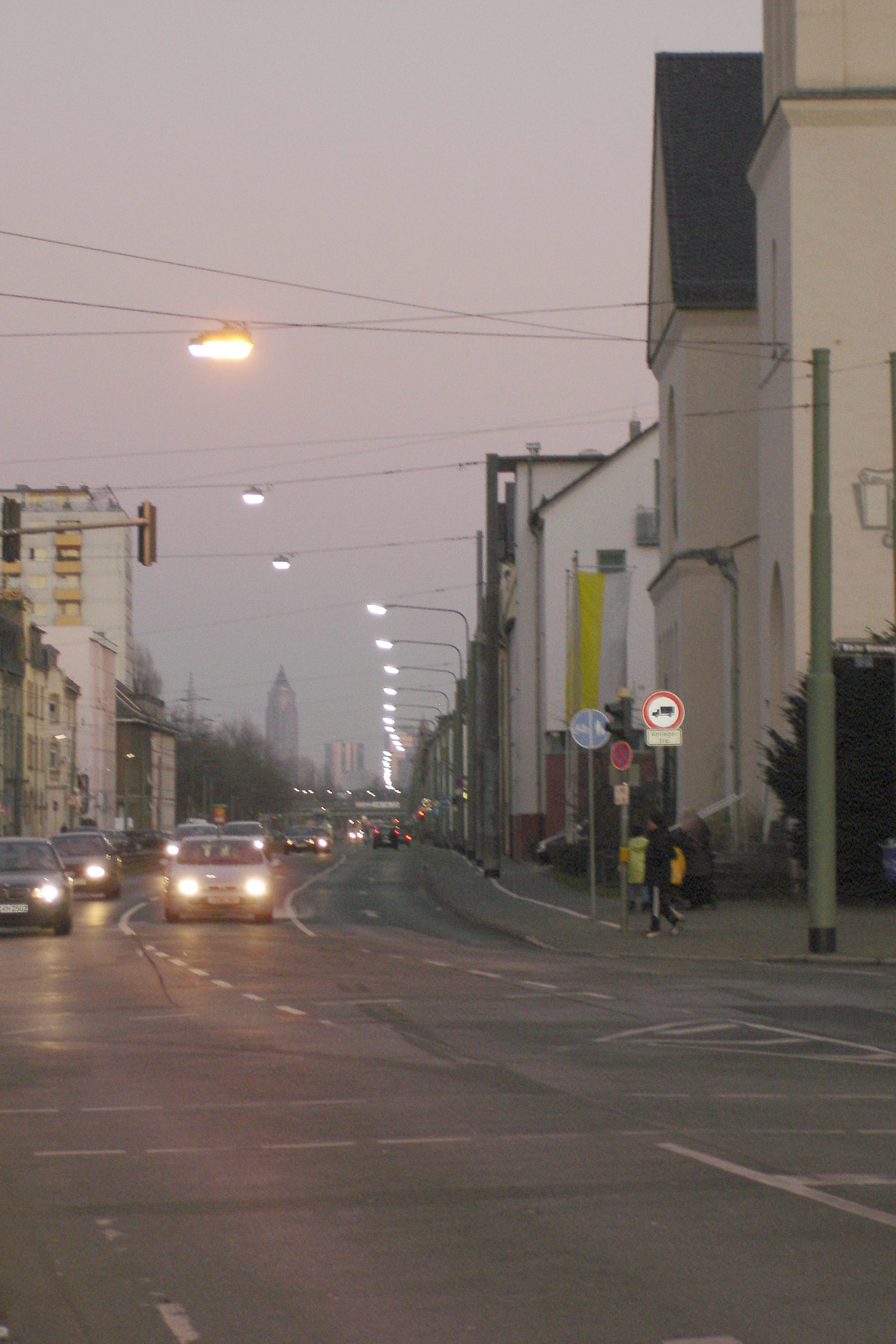 Mainzer Landstraße in Ffm, Blick von Nied-Kirche, Richtung stadteinwärts